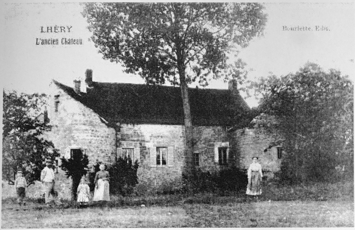 sur une vue ancienne.